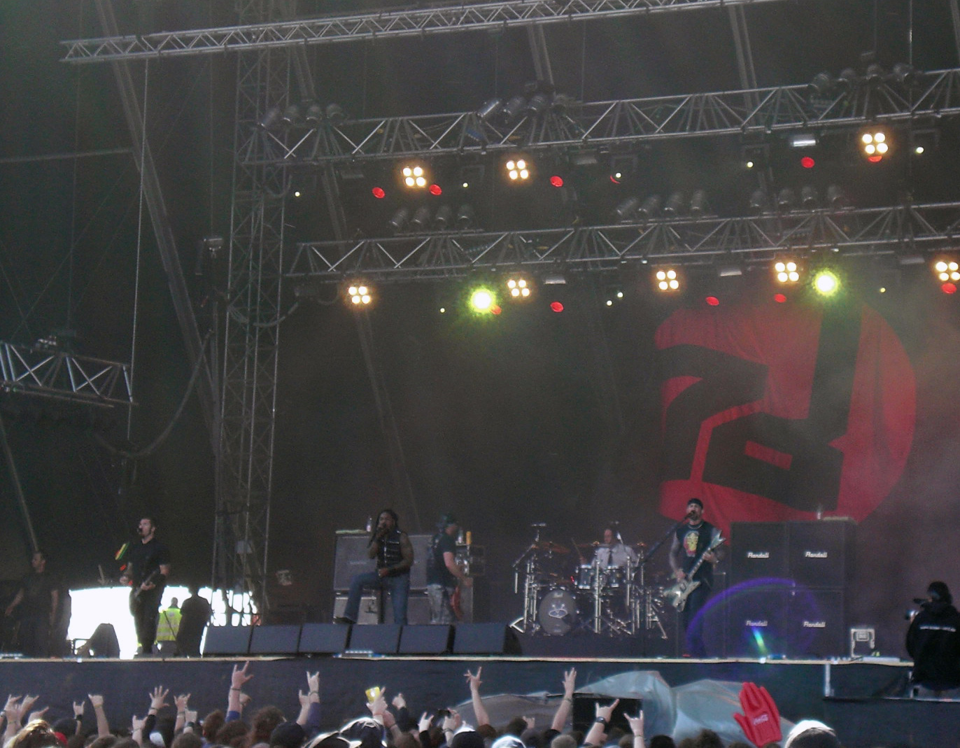 Band Sevendust auf dem Nova Rock Festival in Österreich